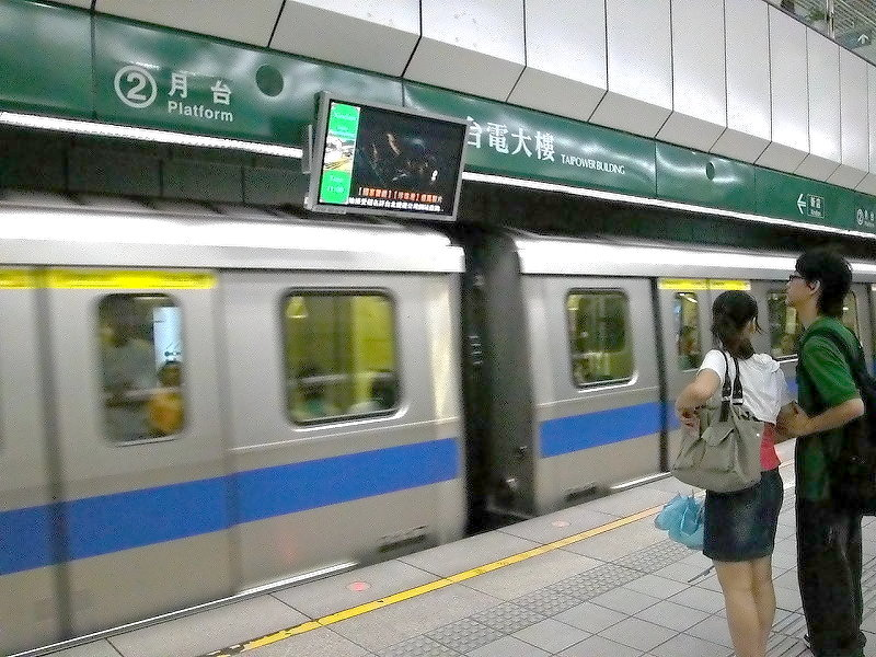 台電大樓站第二月台